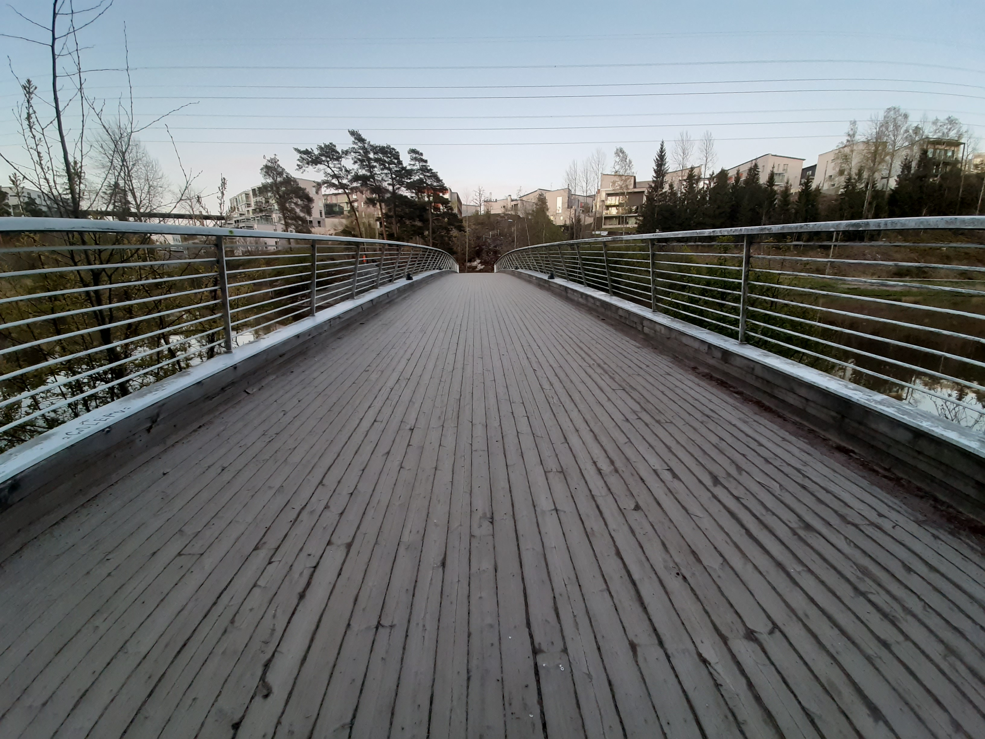 Viikinmäen kevyen liikenteen sillan kansi